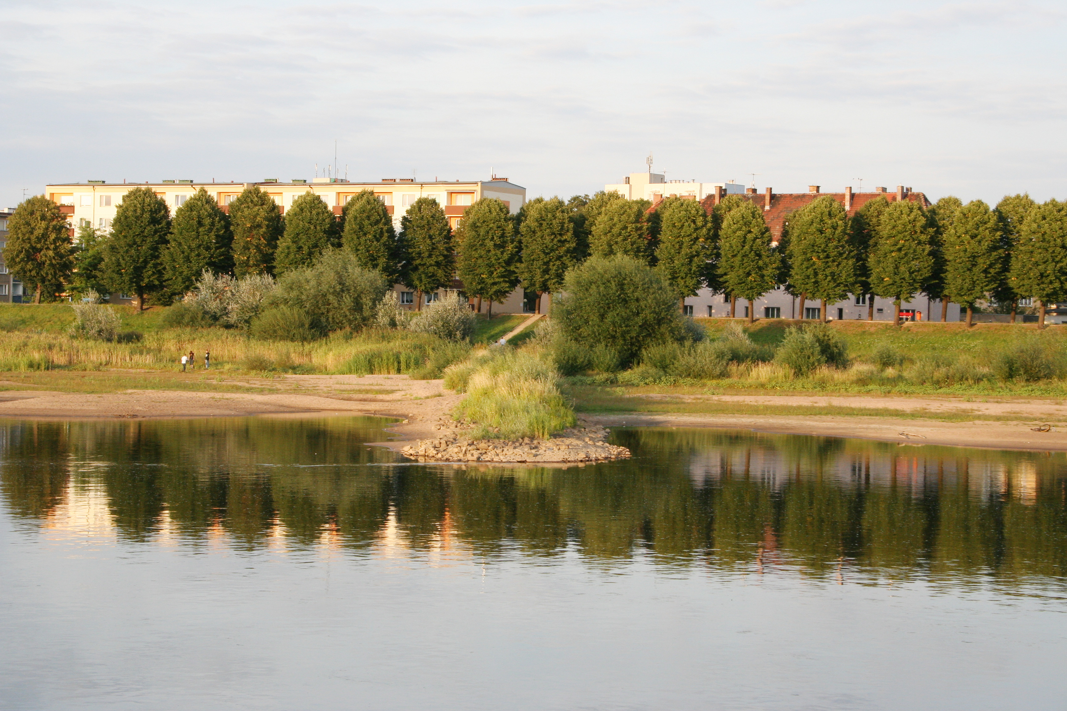 Blick von Frankfurt (Oder) Richtung Slubice